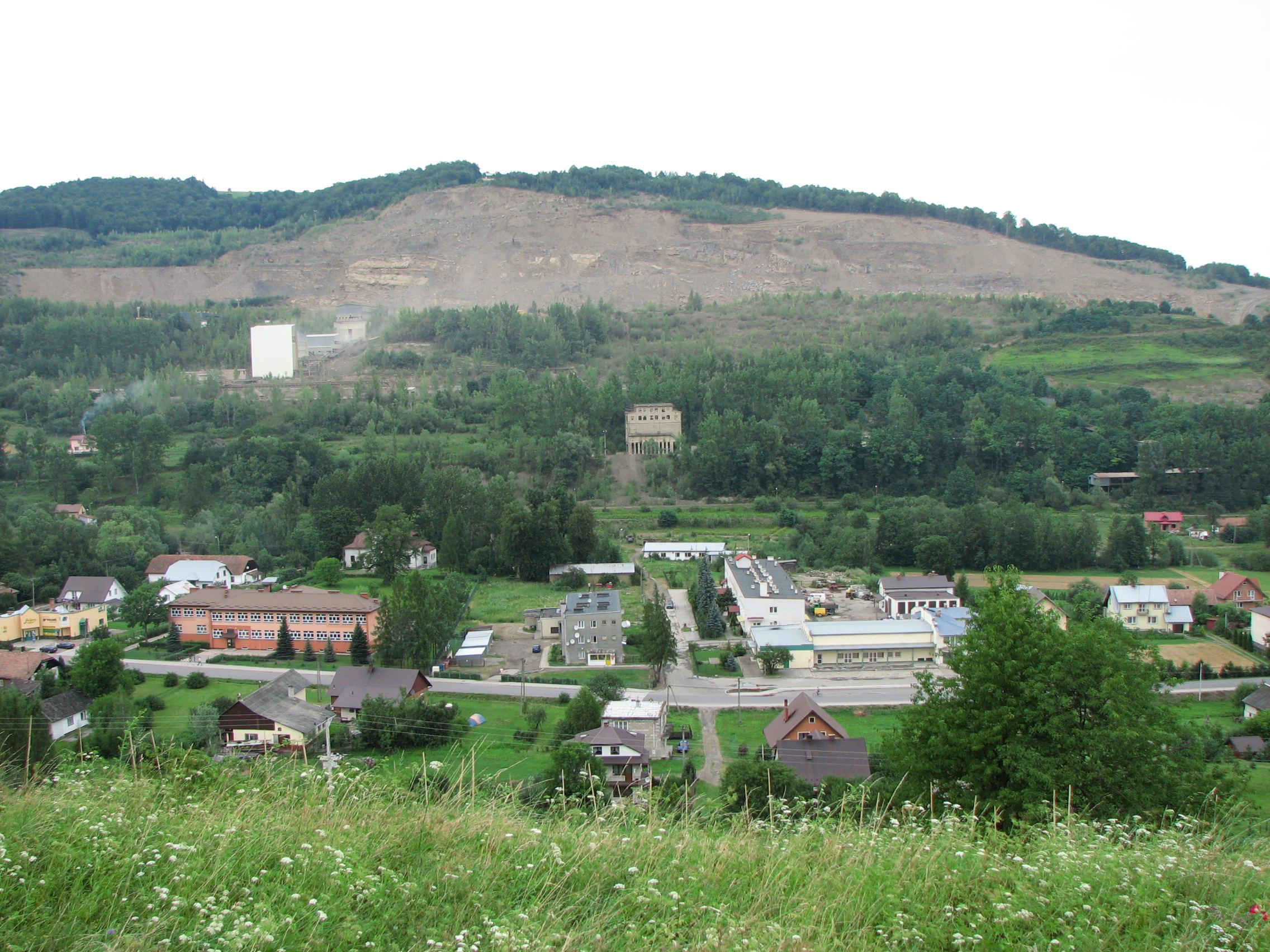 widok na wieś Klęczany i kamieniołom na południowym zboczu Białowodzkiej Góry (Rozdziele).